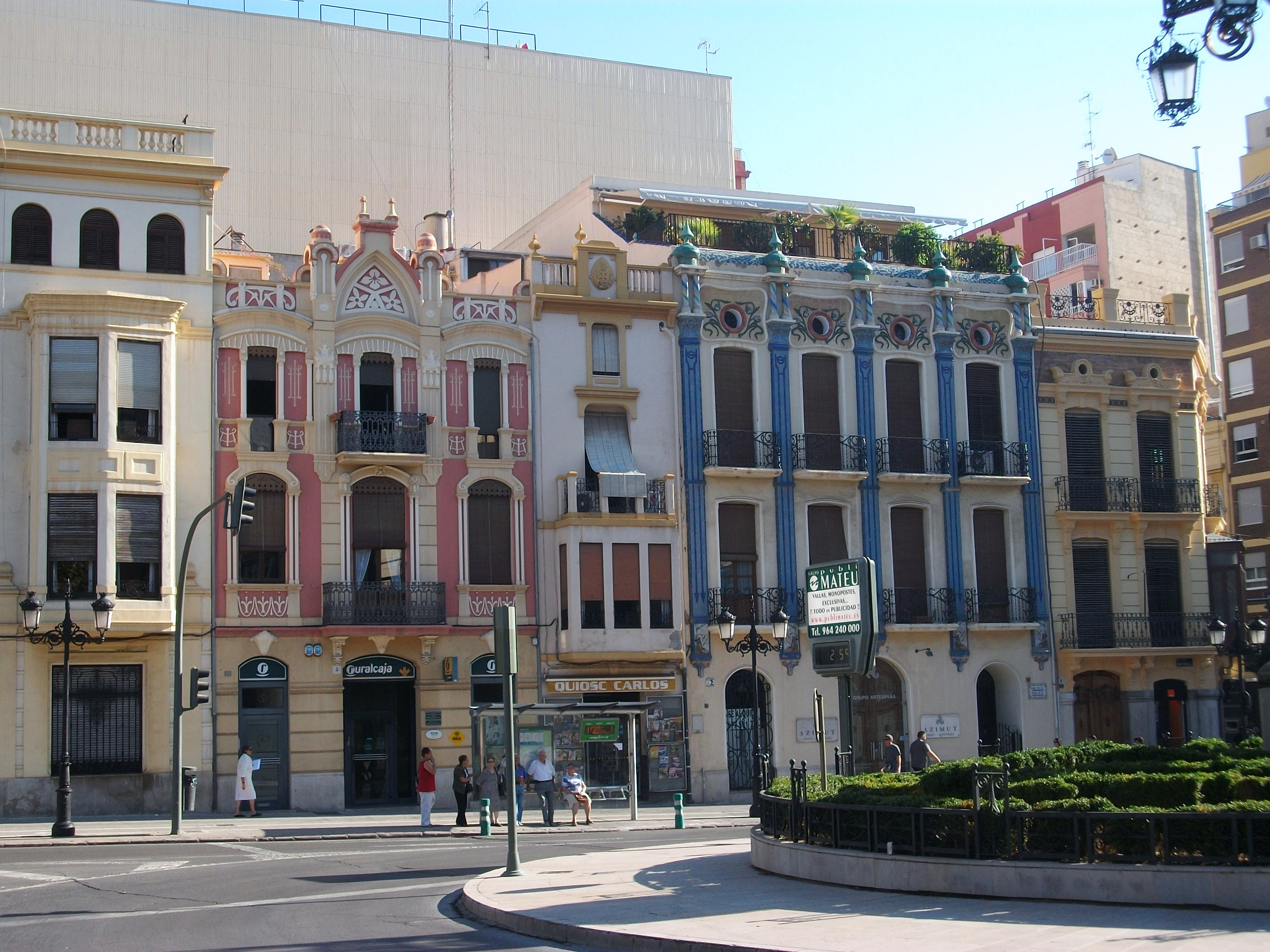 Casa Alcon i casa de les Cigonyes, a la plaça de la Independència o la Farola, Castelló de la Plana.